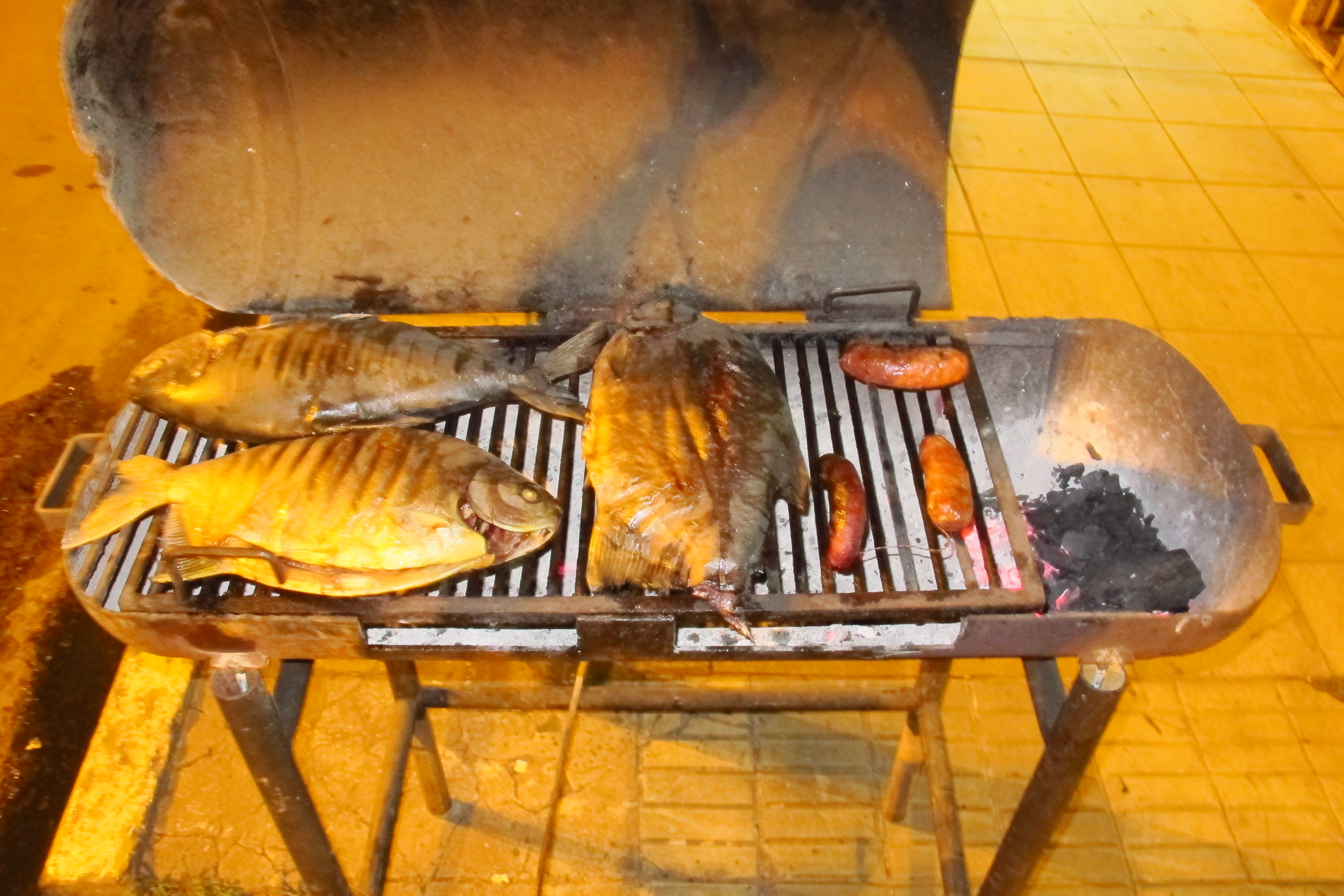 Pescado tipico del Alto Paraná